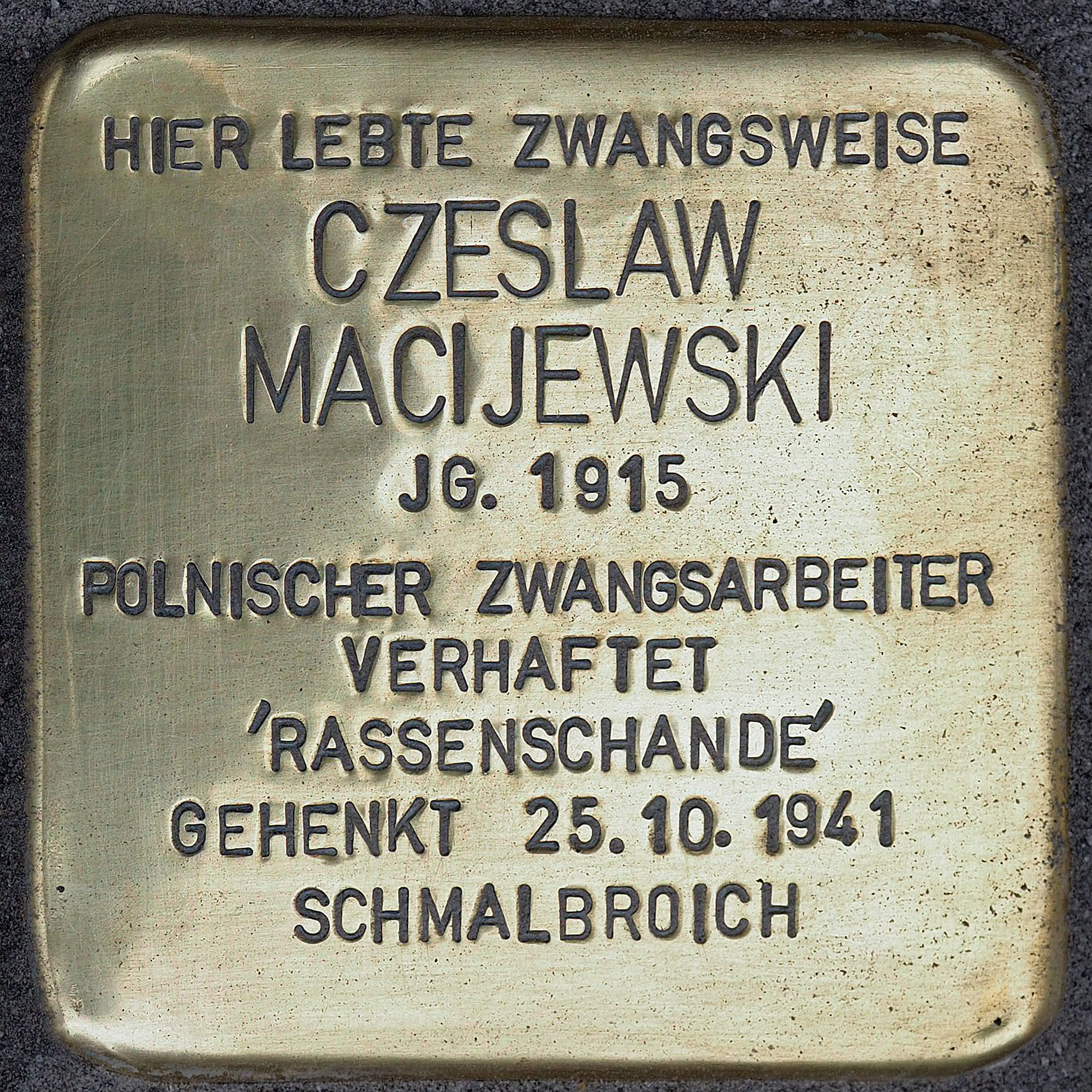 Stolpersteine in Kempen: Macijewski, Czeslwaw